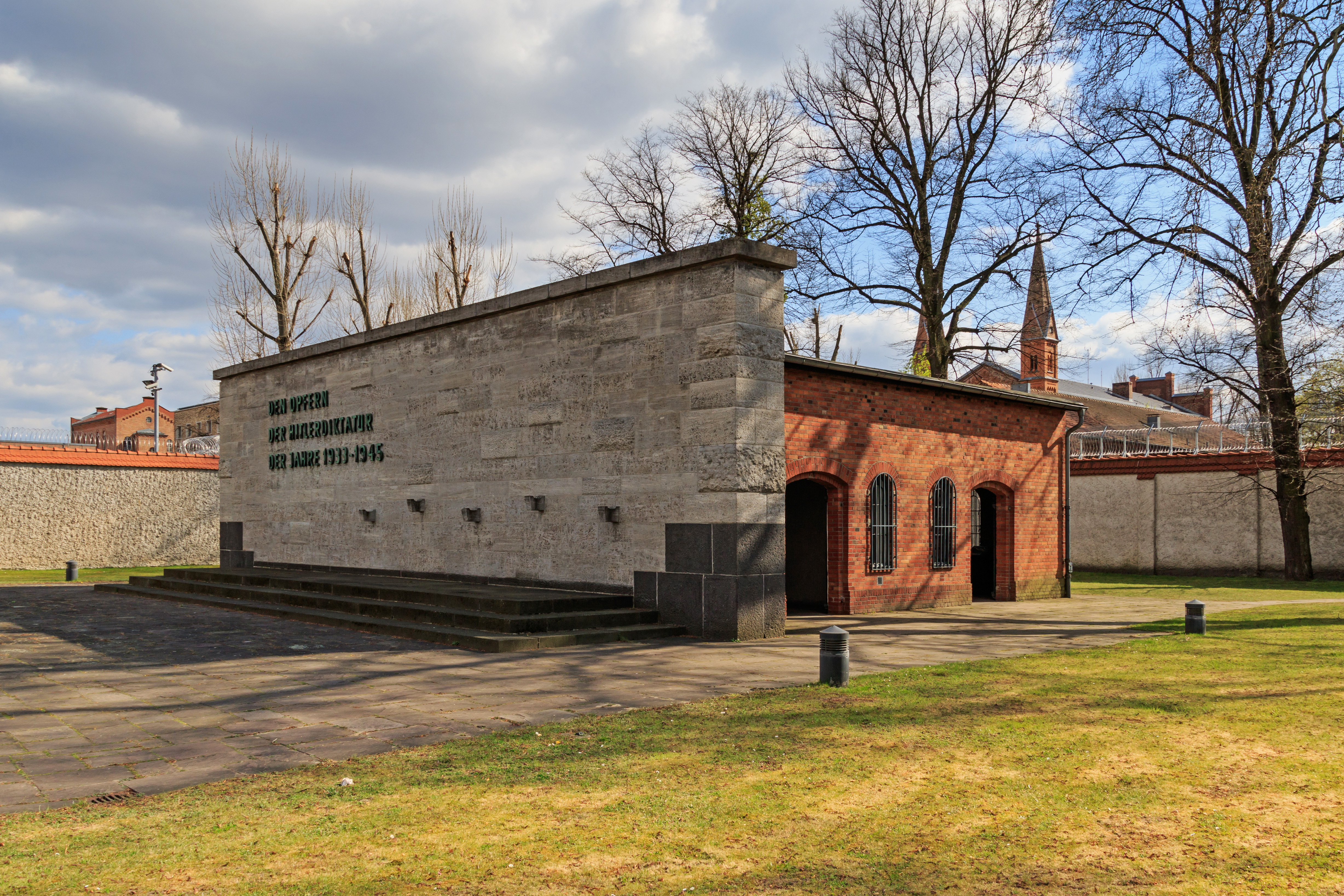 Gedenkstätte Plötzensee: ehem. Hinrichtungsschuppen, Innenhof